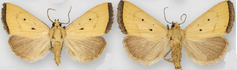 Marimatha squala male (right) female (left)